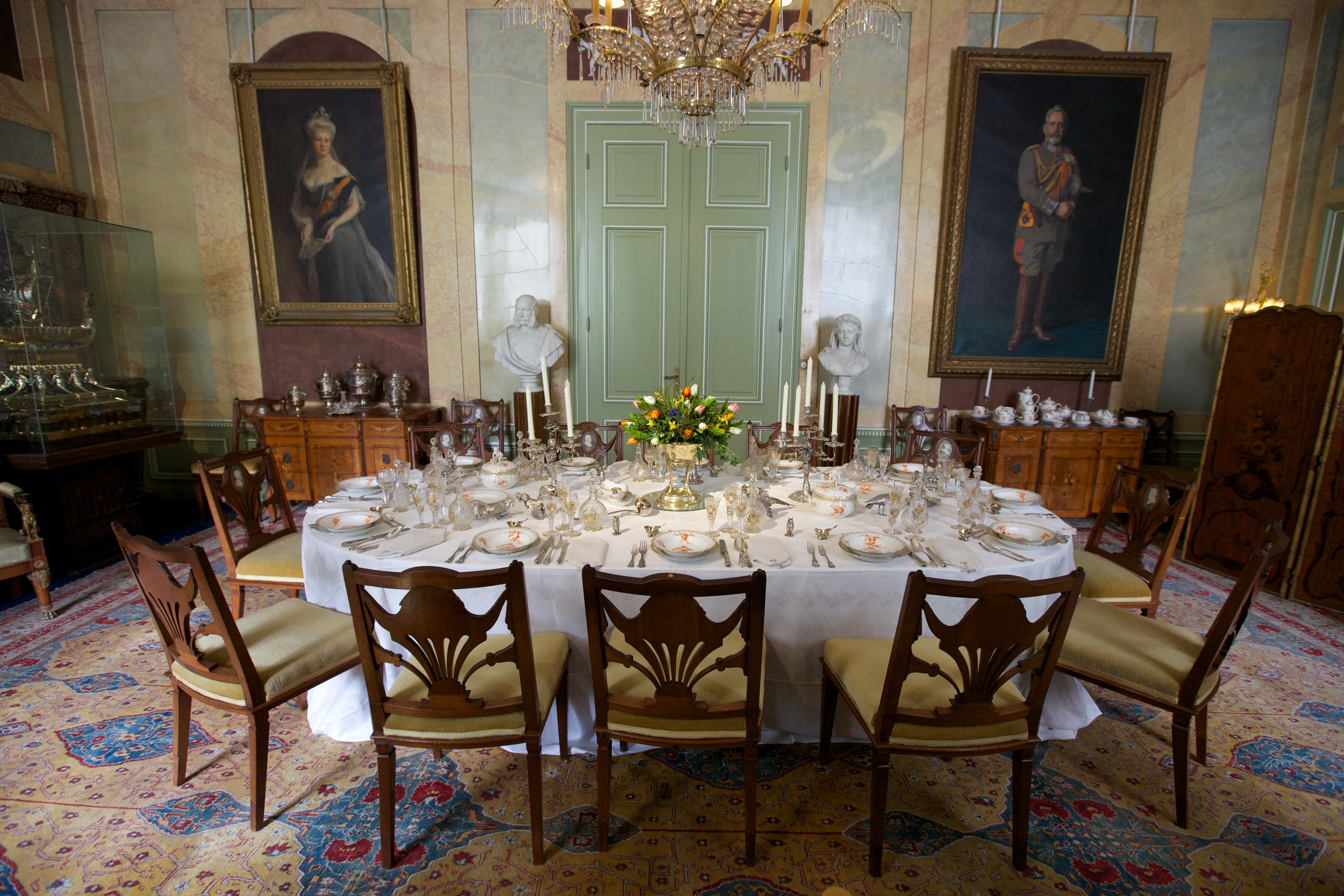 Op zaterdag 29 juni 2013 vond er een internationale edit-a-thon (bijeenkomst om samen artikelen te bewerken) rondom de Eerste Wereldoorlog plaats. In Nederland organiseerde de Vereniging een edit-a-thon om elkaar te ontmoeten en Wikipedia-artikelen te bewerken. Dit vond plaats in het poortgebouw van Huis Doorn, een locatie die normaal niet voor het publiek toegankelijk is. Twee vrijwilligers van stichting Vrienden van Huis Doorn waren aanwezig om inhoudelijk te kunnen helpen. Ook was er een exclusieve rondleiding. Zie voor meer informatie: Wikimedia Nederland participated in the international World War one edit-a-thon on saturday the 29th of June 2013. The event was hosted by Huis Doorn. Venue: Venue volunteers